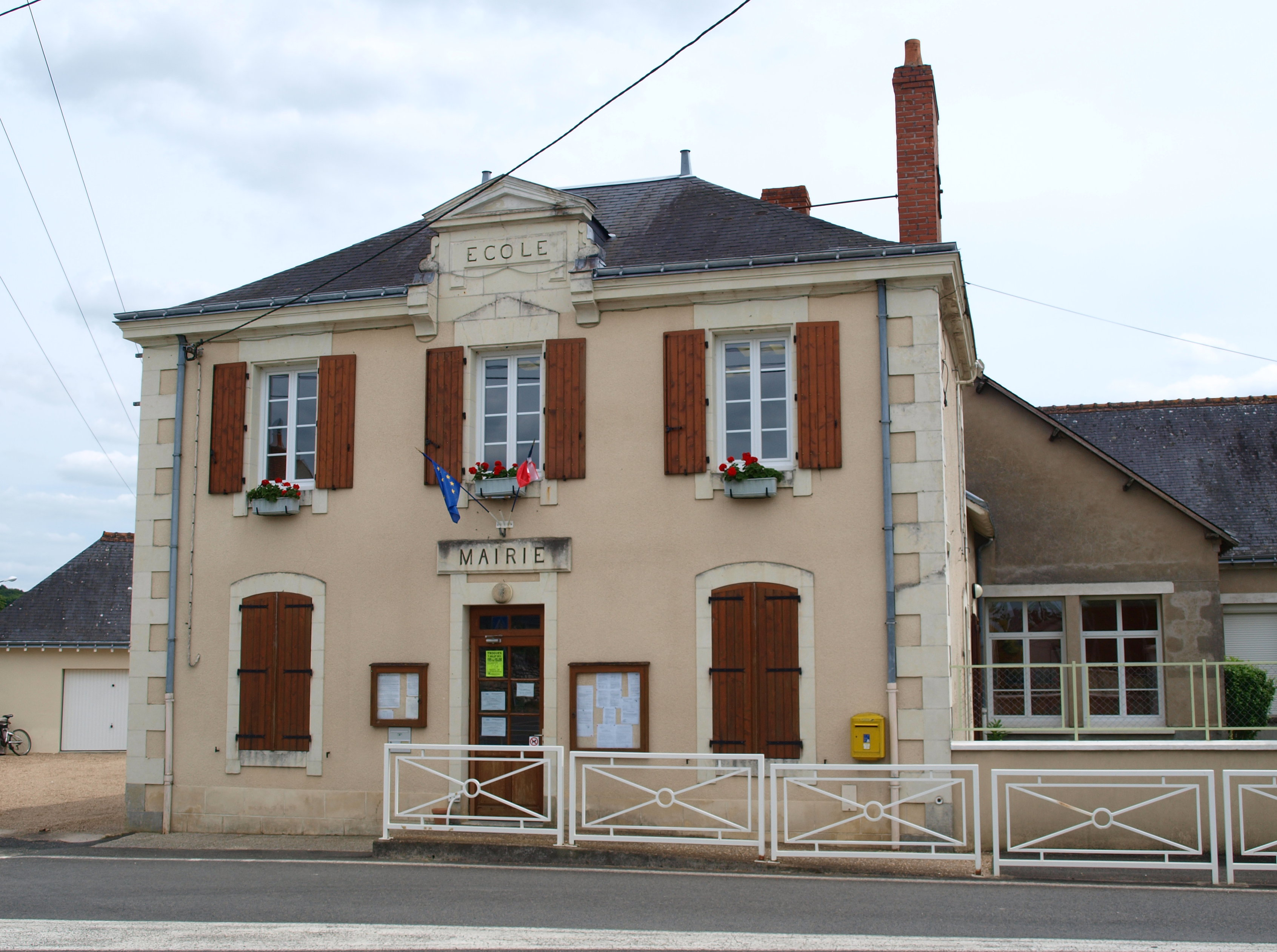 Trogues (Indre-et-Loire, France) ; la mairie.